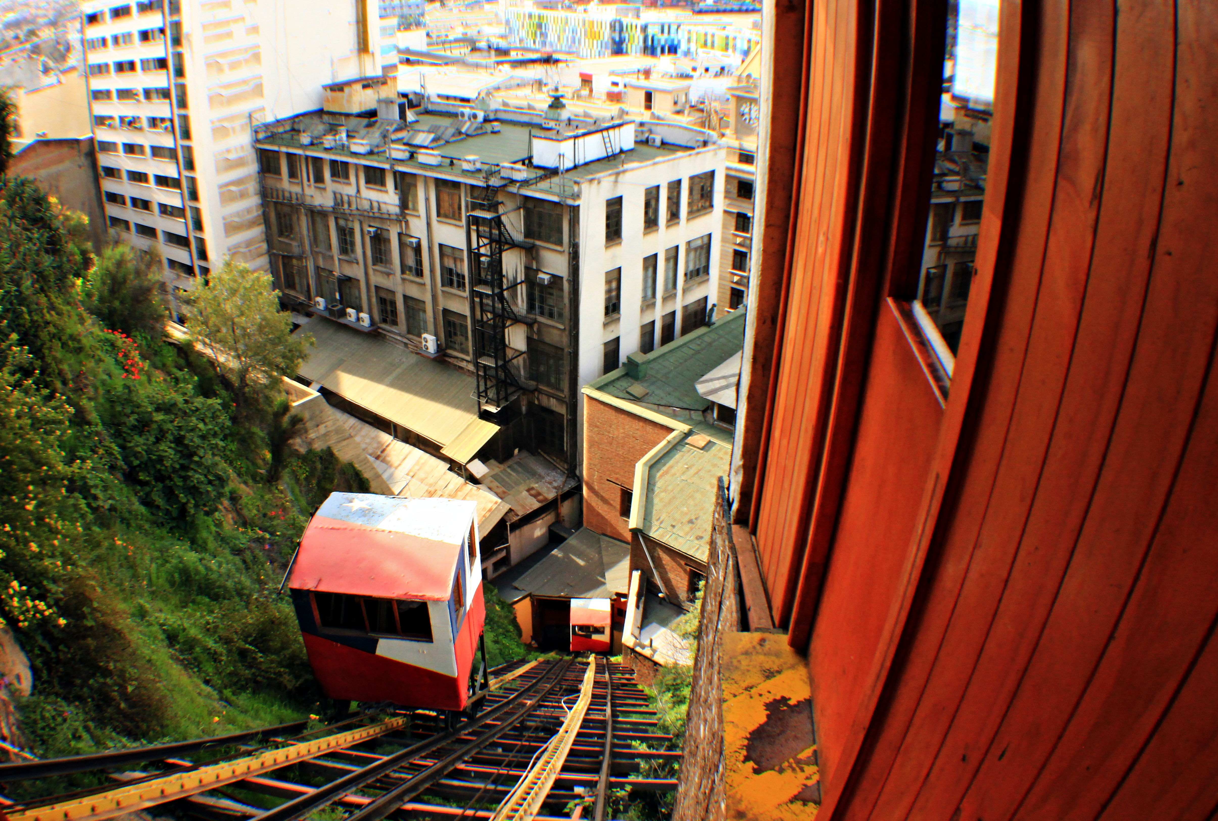 Ascensor Cerro Concepción This is a photo of a national monument in Chile: 775